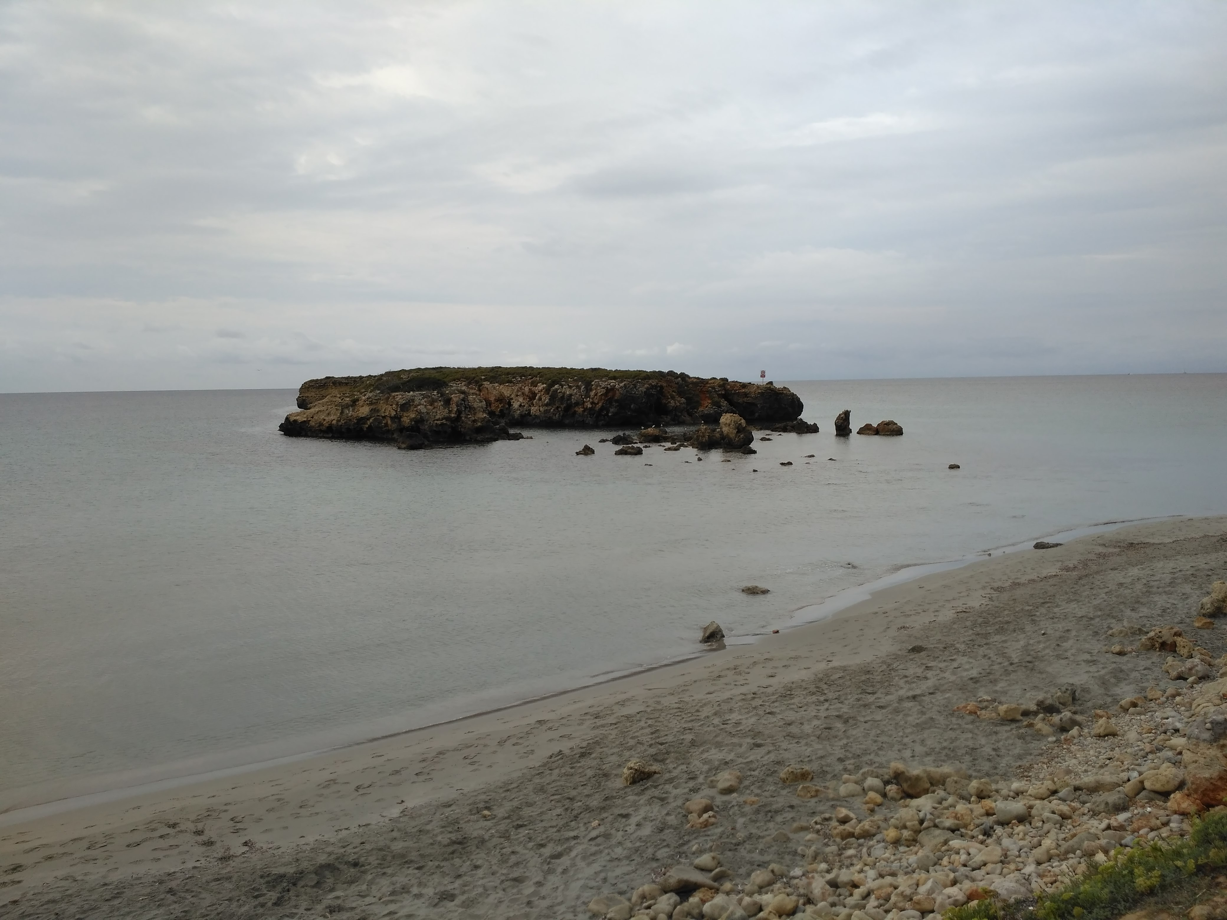 Detalle del islote en Binigaus This is a photography of a Special Area of Conservation in Spain with the ID: ES0000239. Natura2000 entry, EEA entry